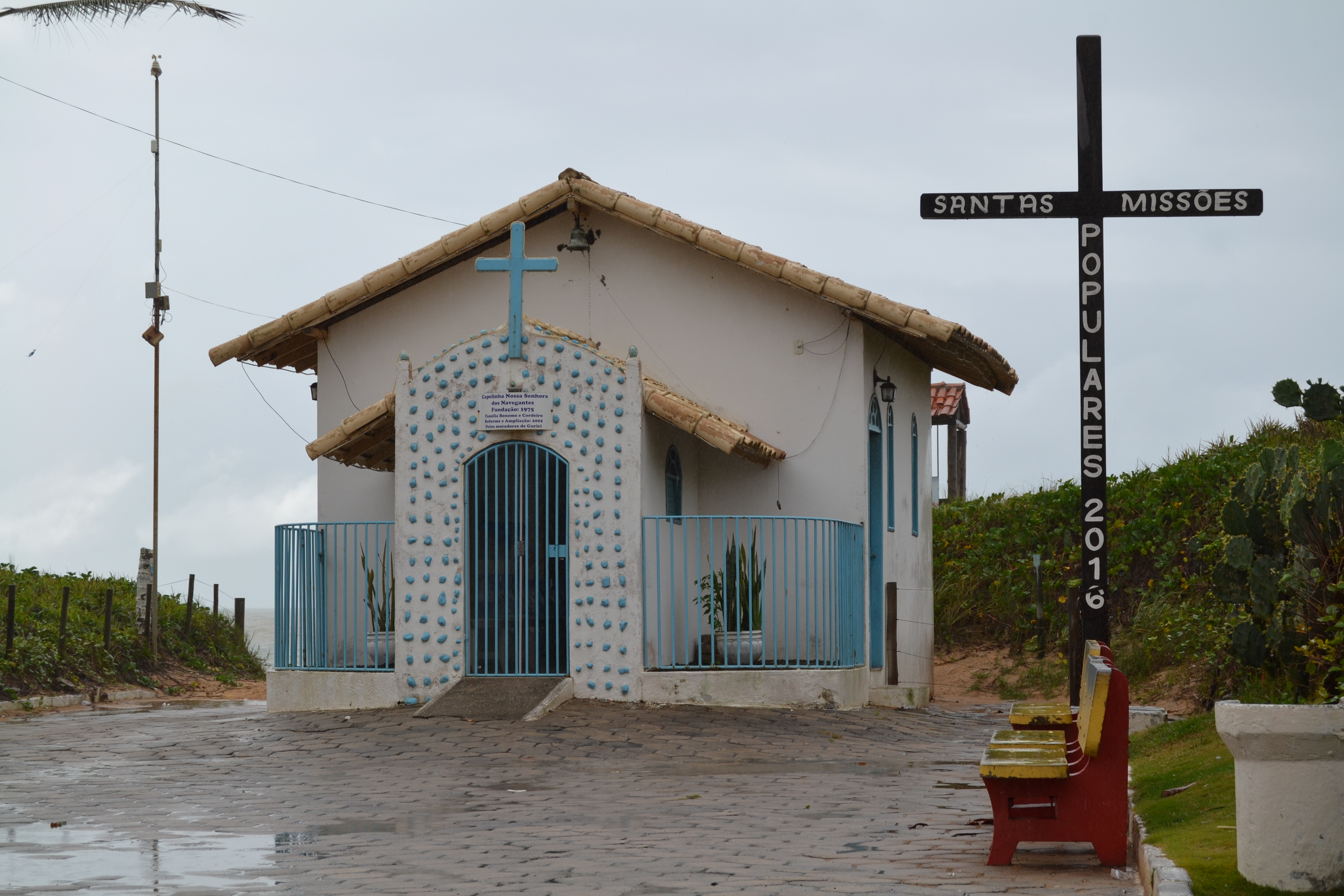 Igrejinha de Guriri no bairro de Guriri em São Mateus no Espírito Santo.